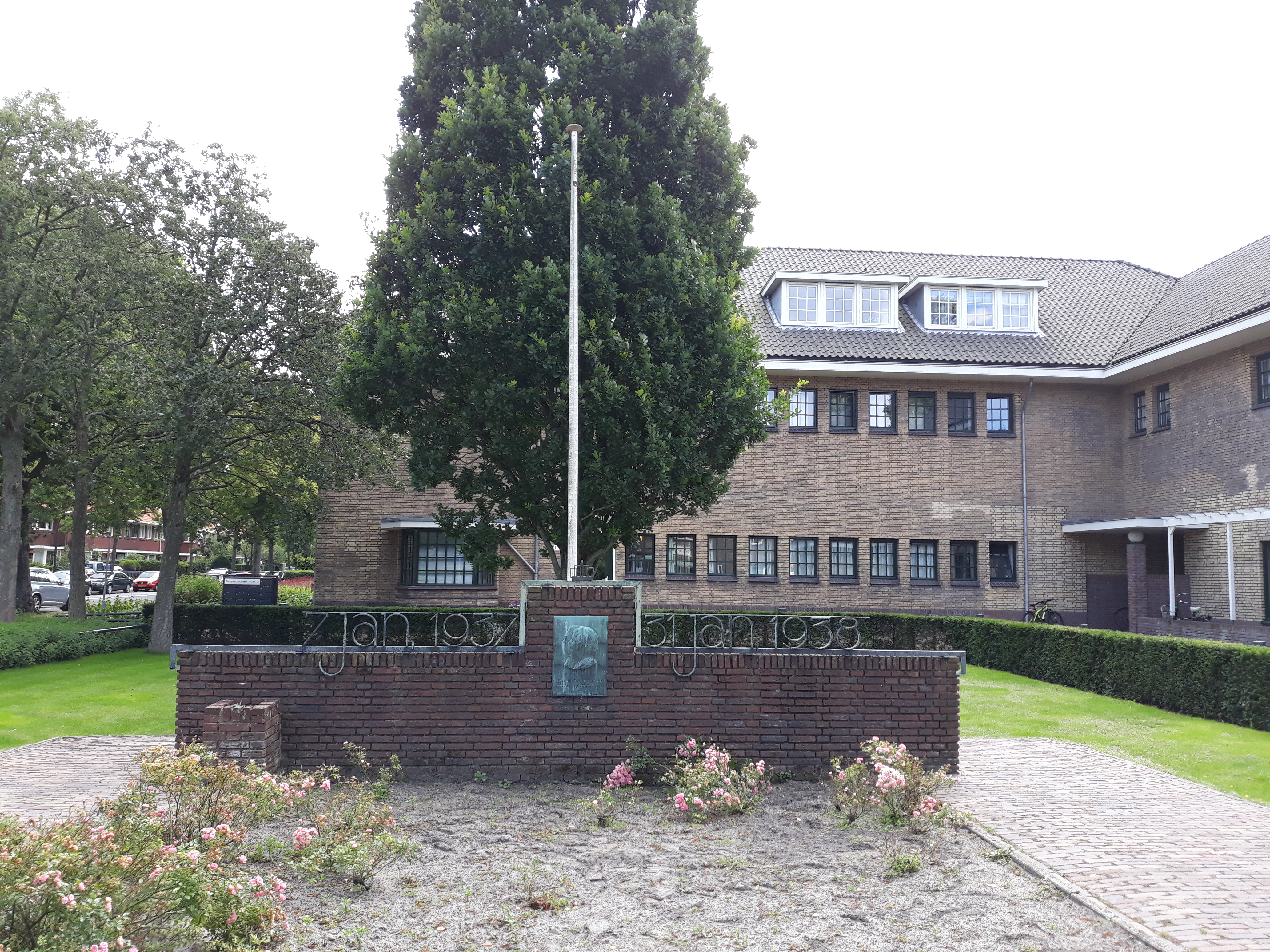 Denkmal zur Geburt der späteren Königin der Niederlande Beatrix in Wassenaar (Südholland).